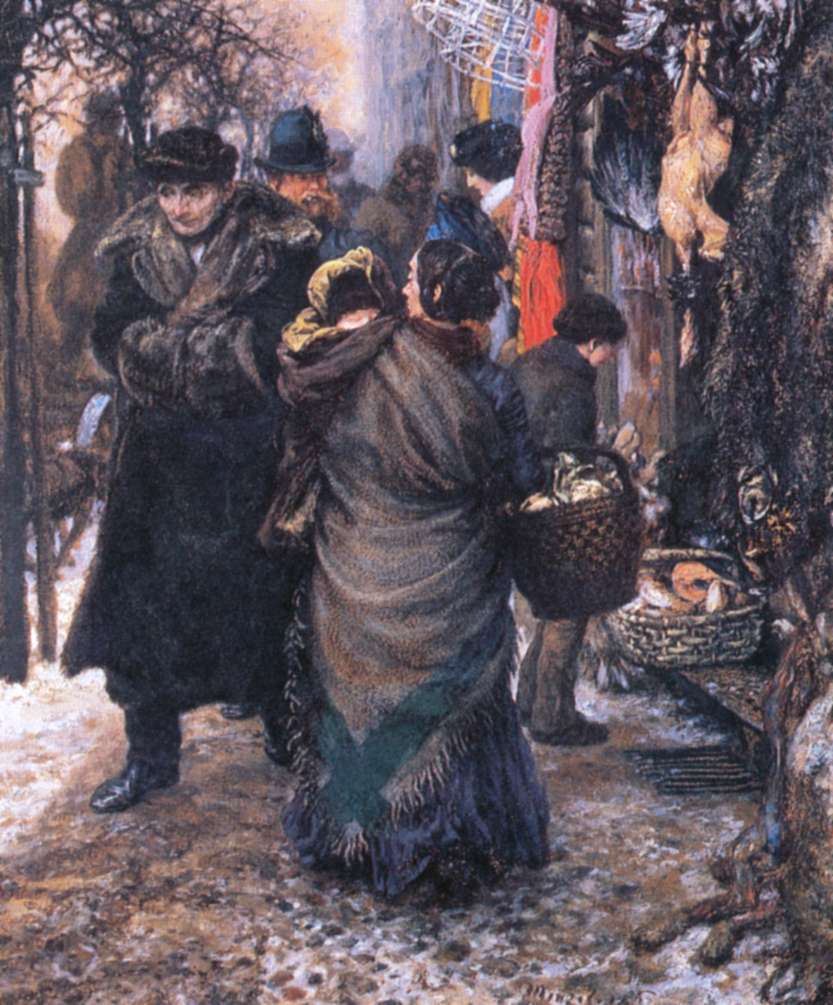 Adolph Menzel, Wintermarkt, Gouache 1862, Stiftung Stadtmuseum Berlin